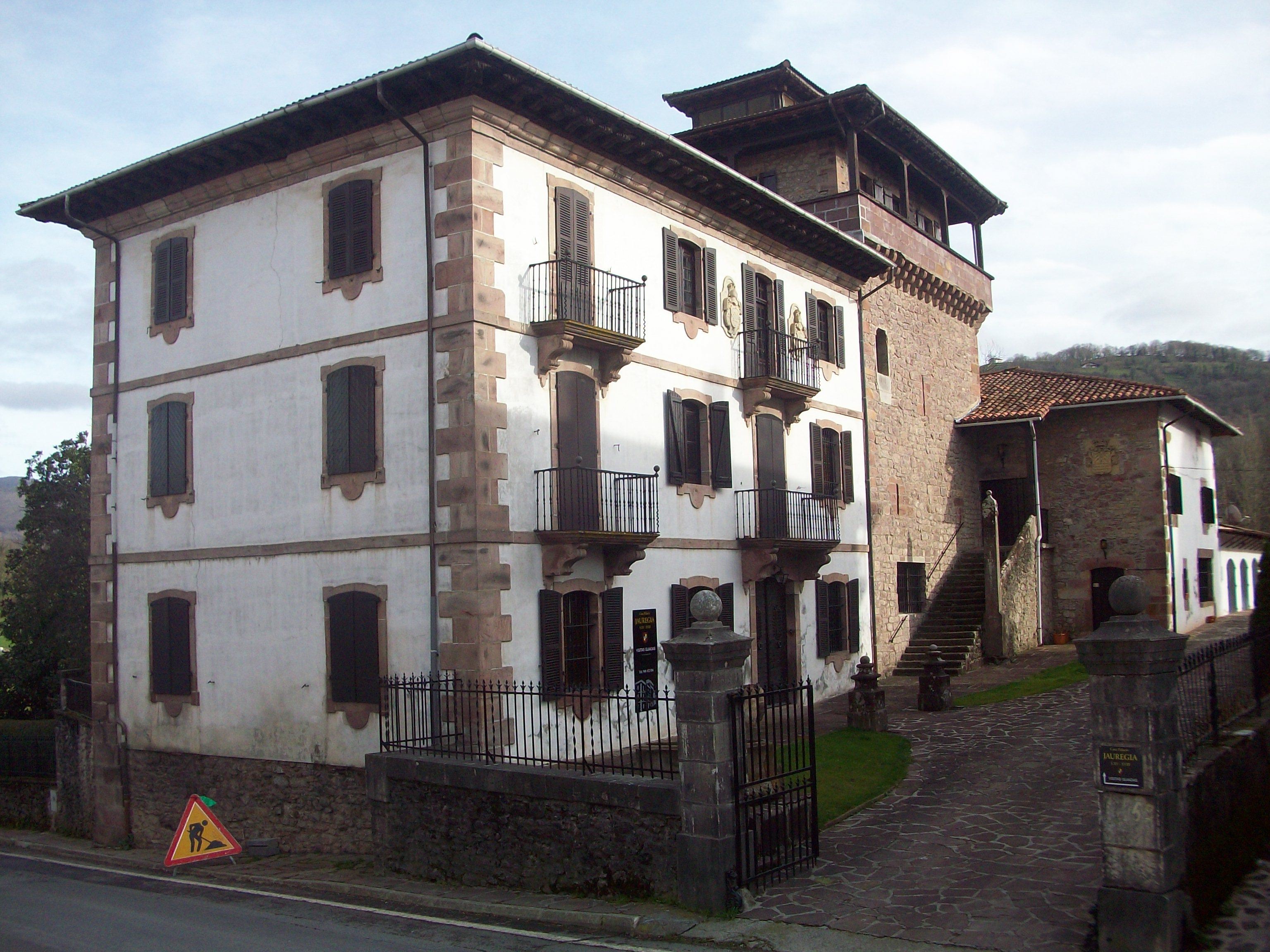 Baztango Irurita herriko Jauregia dorretxea. Nafarroa, Euskal Herria. Jauregia tower in Irurita, Baztan. Navarre, Basque Country.